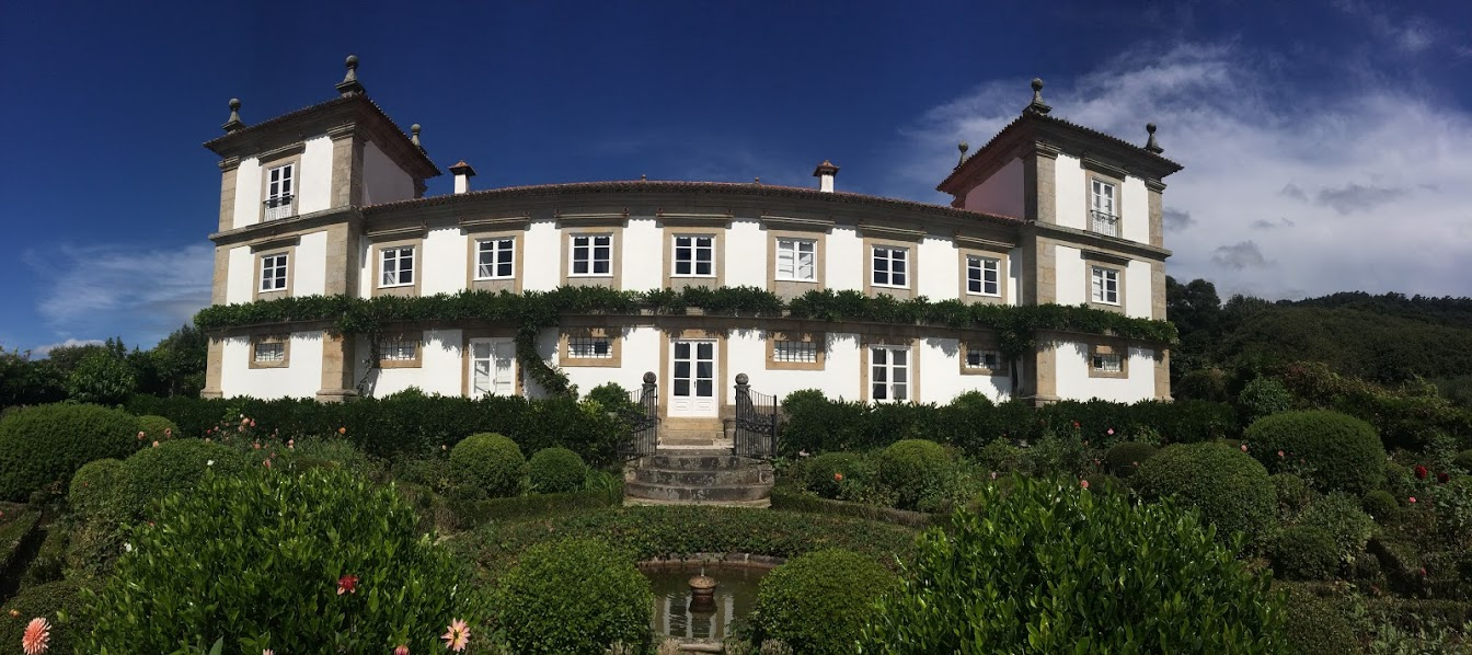 Fachada do Paço de Calheiros